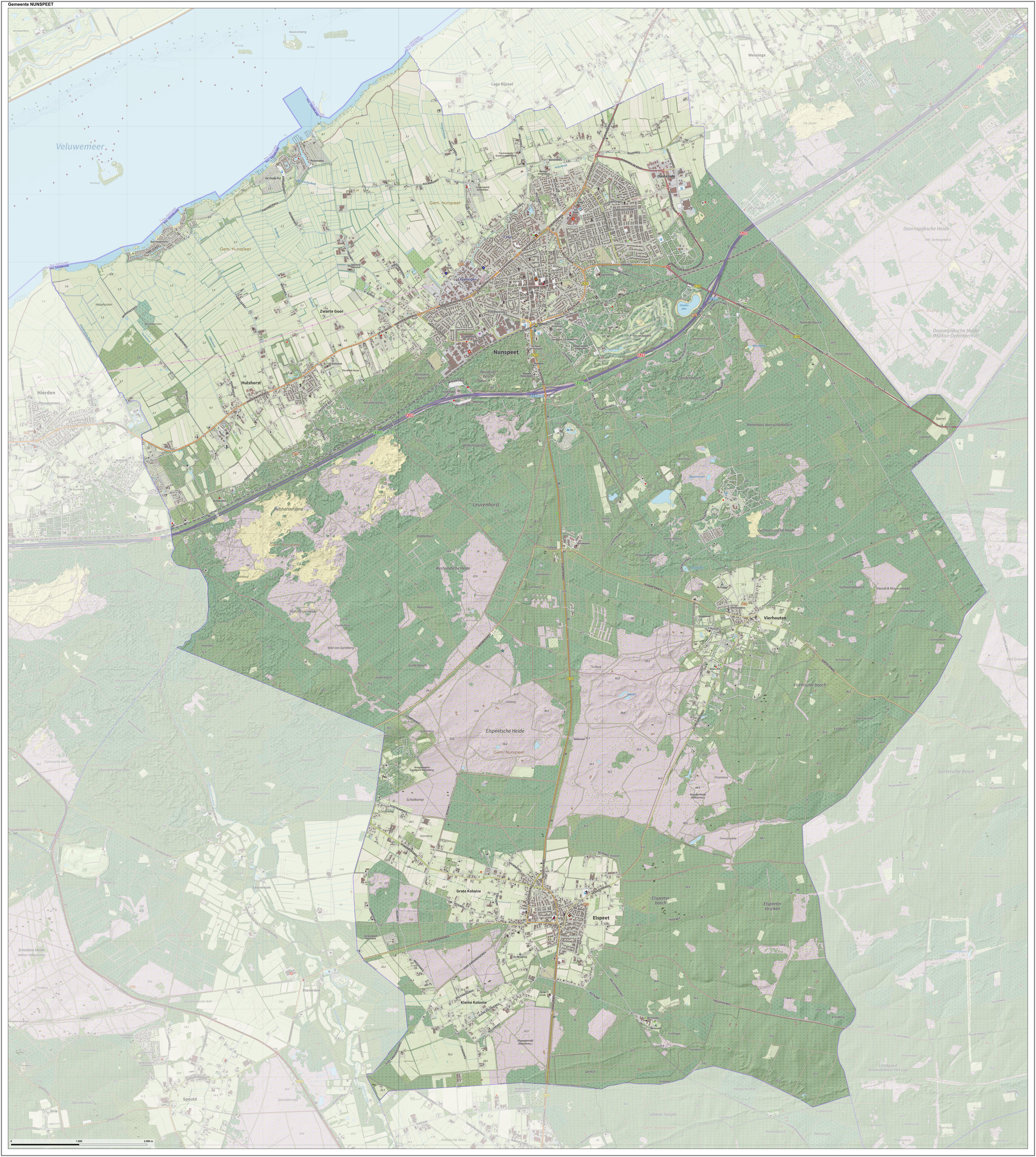 Topografische gemeentekaart. Resolutie: 400 pixels/km. Kaartbeeld samengesteld uit de open geodata van de Top10NL en Top25namen (Kadaster), Creative Commons-BY licentie. Gebouwvlakken uit open geodata BAG extract. Wegen uit de OpenStreetMap, OpenStreetMap community. Reliëfschaduw uit de Actuele Hoogtekaart AHN2. Samenstelling en kleurenschema: Jan-Willem van Aalst, met QGIS. Zie ook de Legenda.